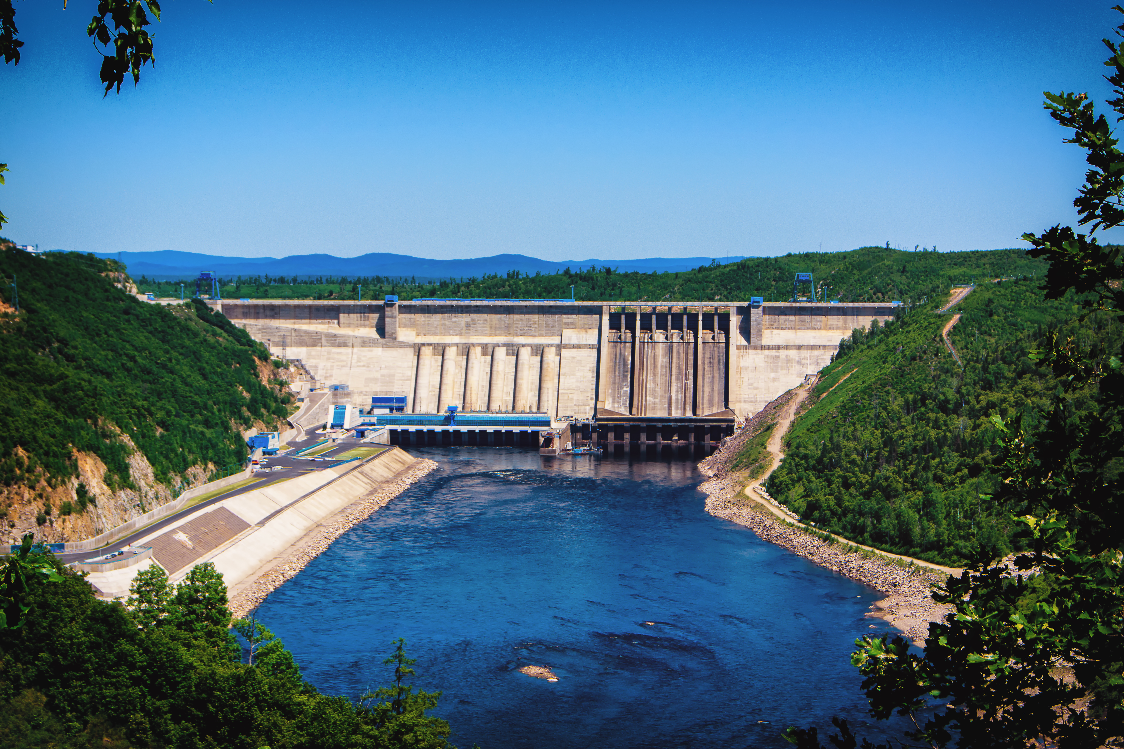 Талаканский створ на реке Бурее: Бурейский район, Амурская область This image is related to the protected area of Russia number 2820060